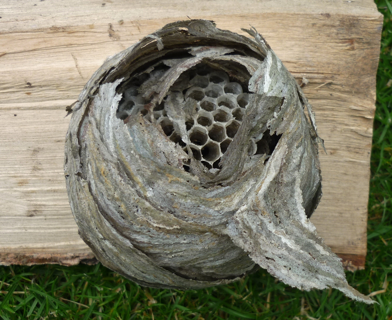 Opuszczone gniazdo z widocznym plastrem, w którym składane były jaja.